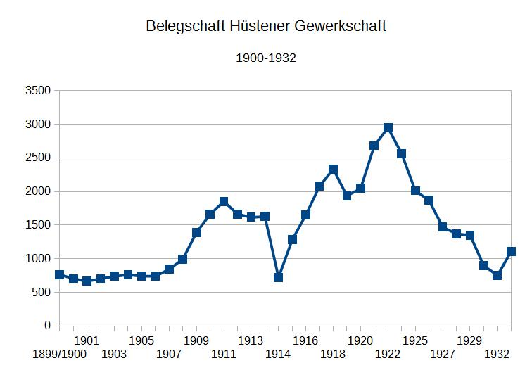 Quellen WWA F65 435, 455, 739, 838, Thyssen-Krupp VSt 27, Theodor Thüsing: Die wirtschaftliche Entwicklung des Kreises Arnsberg. Diss Münster, 1921 S.114, Jens Hahnwald: Die Hüstener Gewerkschaft. Werk, Belegschaft und Gemeinde 1839-1926. In: Hüsten 1200 Jahre. Arnsberg, 2002 S.239